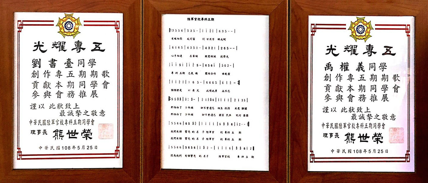 陸軍官校專科五期期歌樂譜與貢獻期歌感謝狀